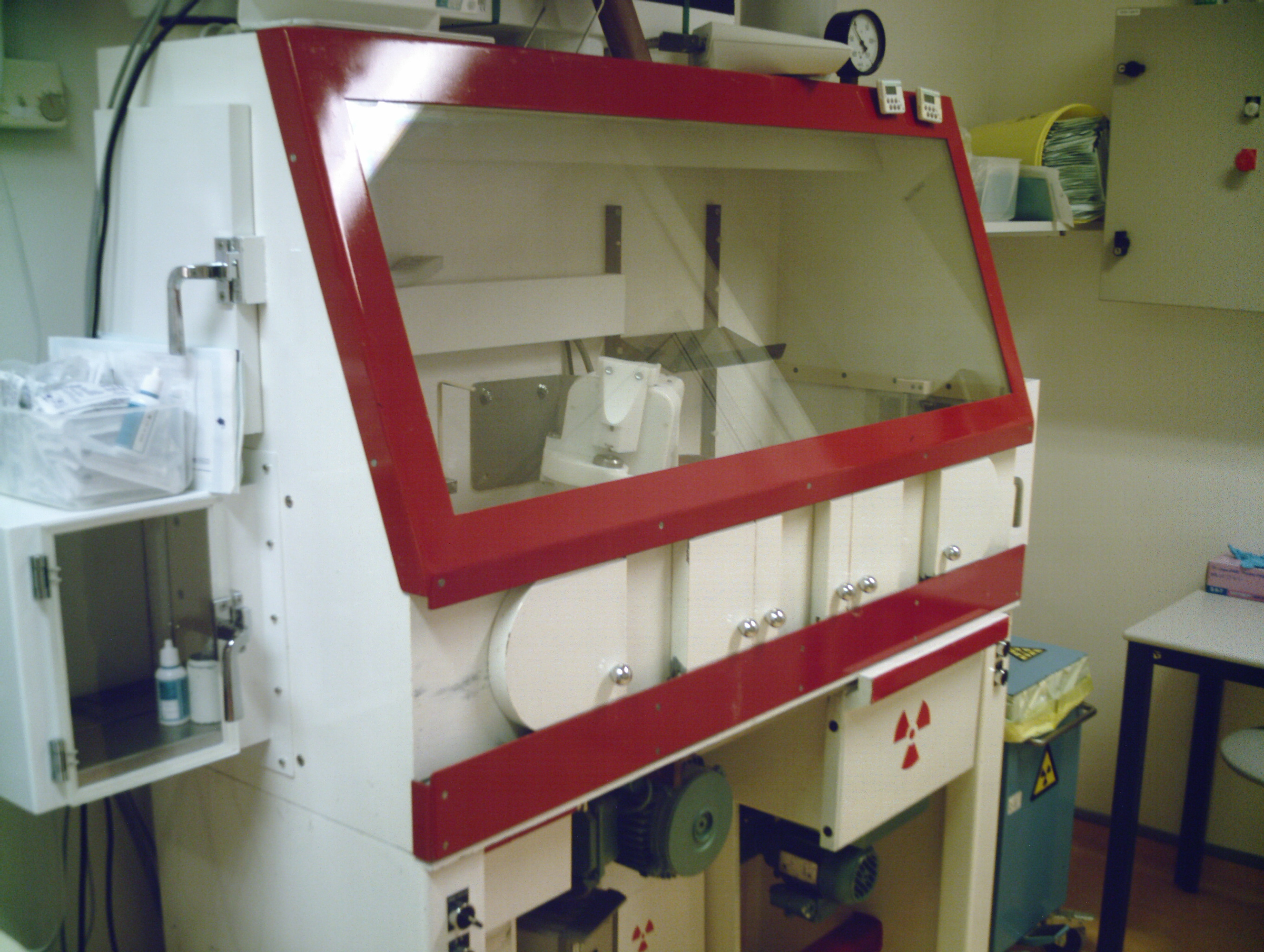 Hotte avec vitre et paroi plombées dans un service de médecine nucléaire permettant la production et la mise en seringue du technétium 99m pour l'imagerie monophotonique